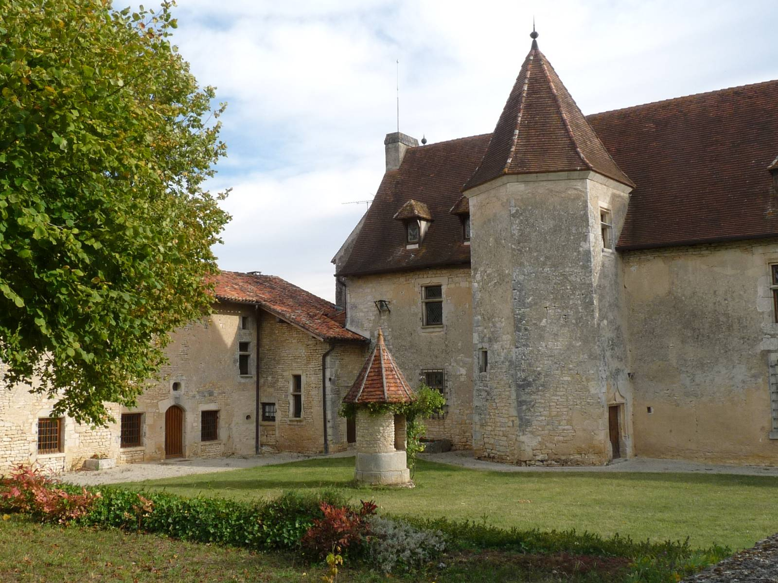 château de Chenon, Charente, France